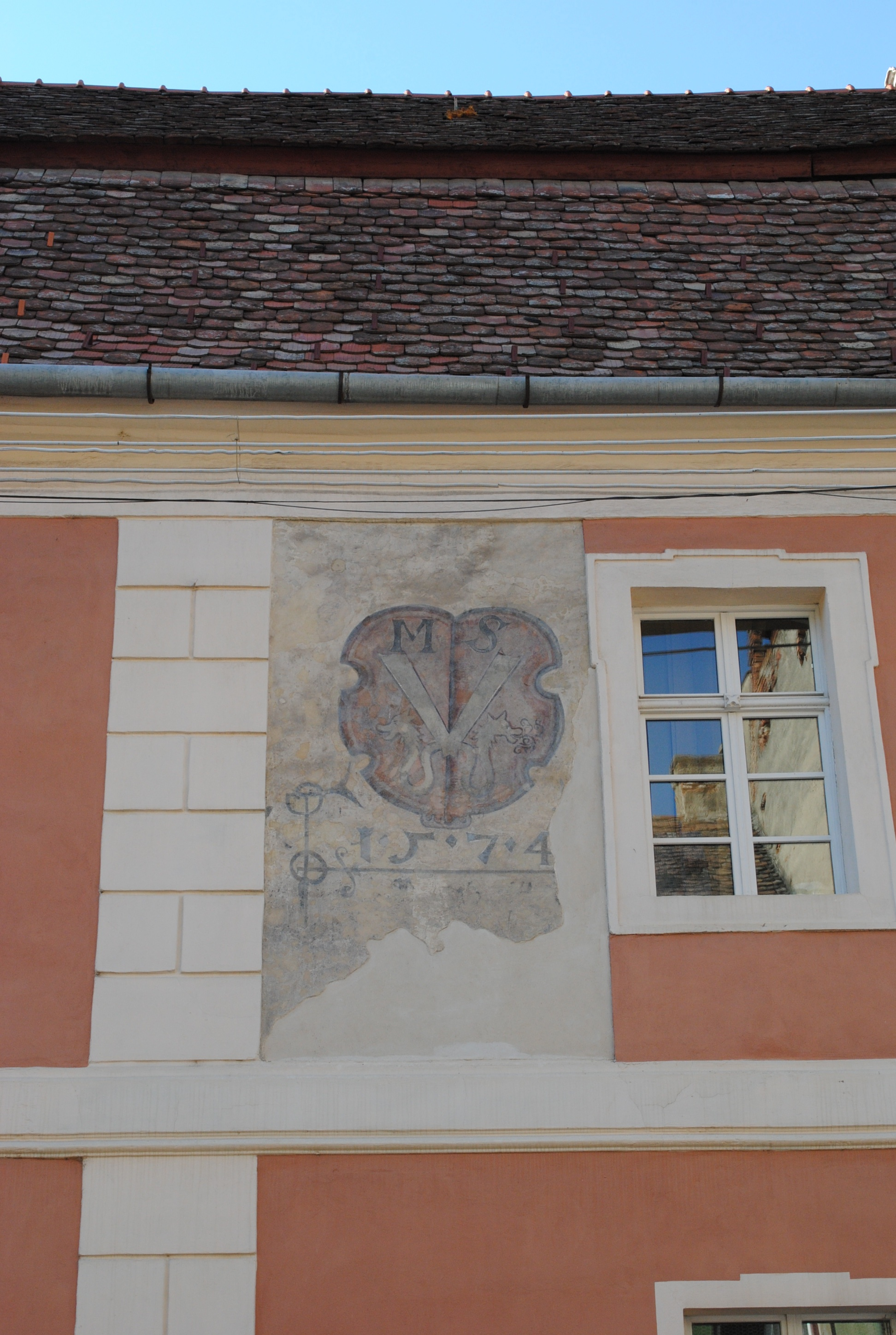 Casă, a doua jum. sec. XIV - sec. XIX